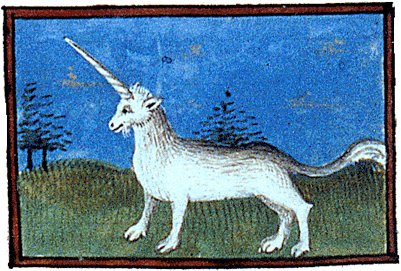 Licorne dans le Livre des propriétés des choses de Barthélémy l’Anglais, début du XVème siècle.